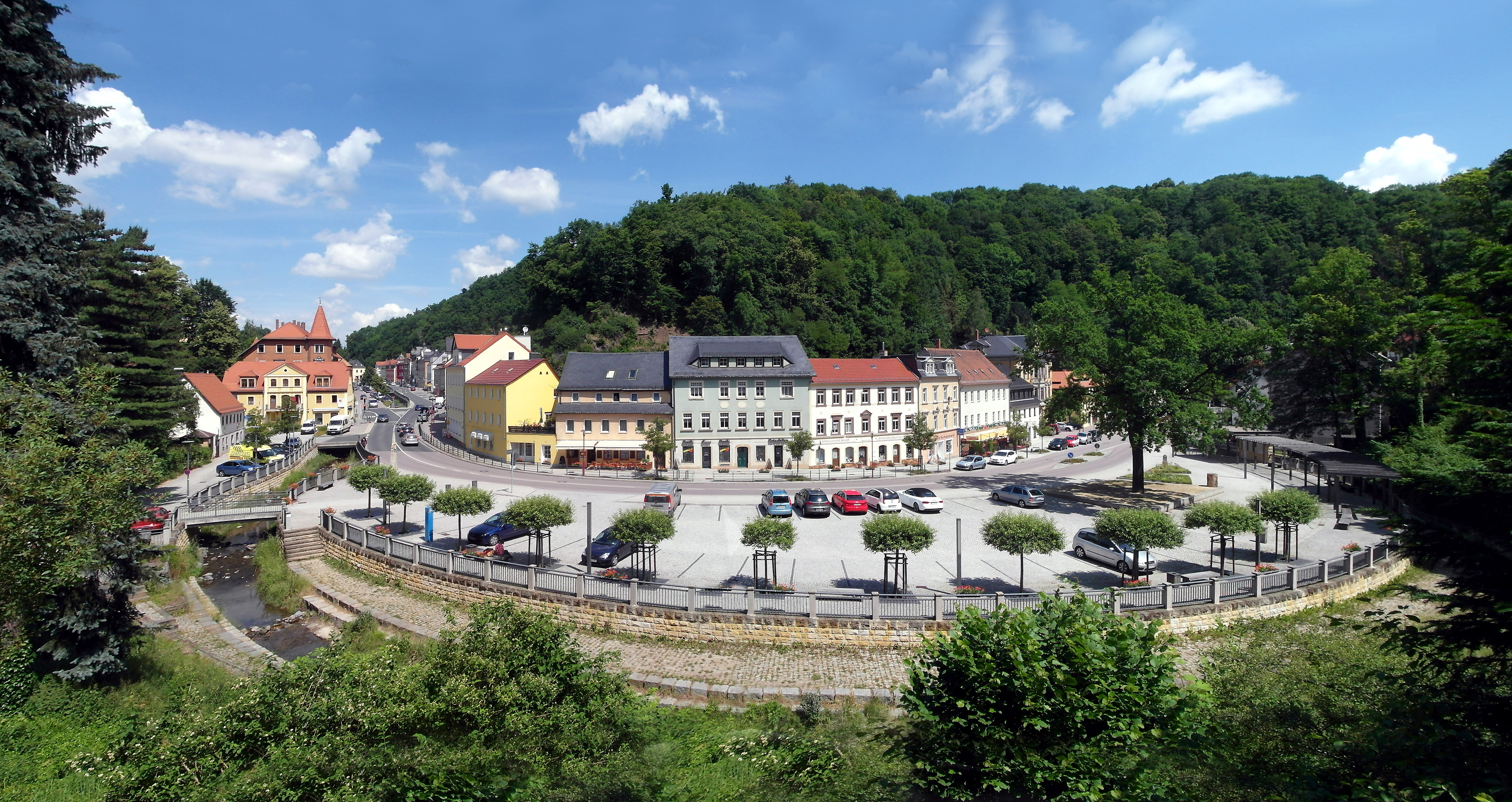 18.06.2014 01737 Tharandt: Panorama vom Burgberg auf Tharandt, Am Markt (GMP: 50.983478,13.581759), Roßmäßlerstraße. [SAM2729+4730+4733.JPG]20140618300MDR.JPG(c)Blobelt